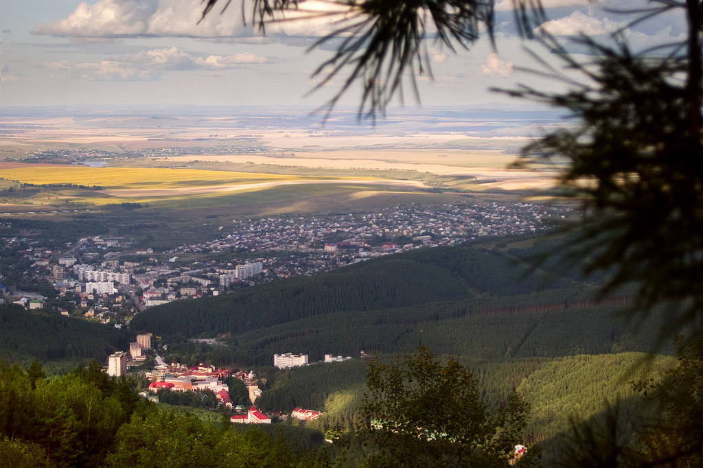 Белокуриха, Алтайский край. Вид на город с горы Церковка